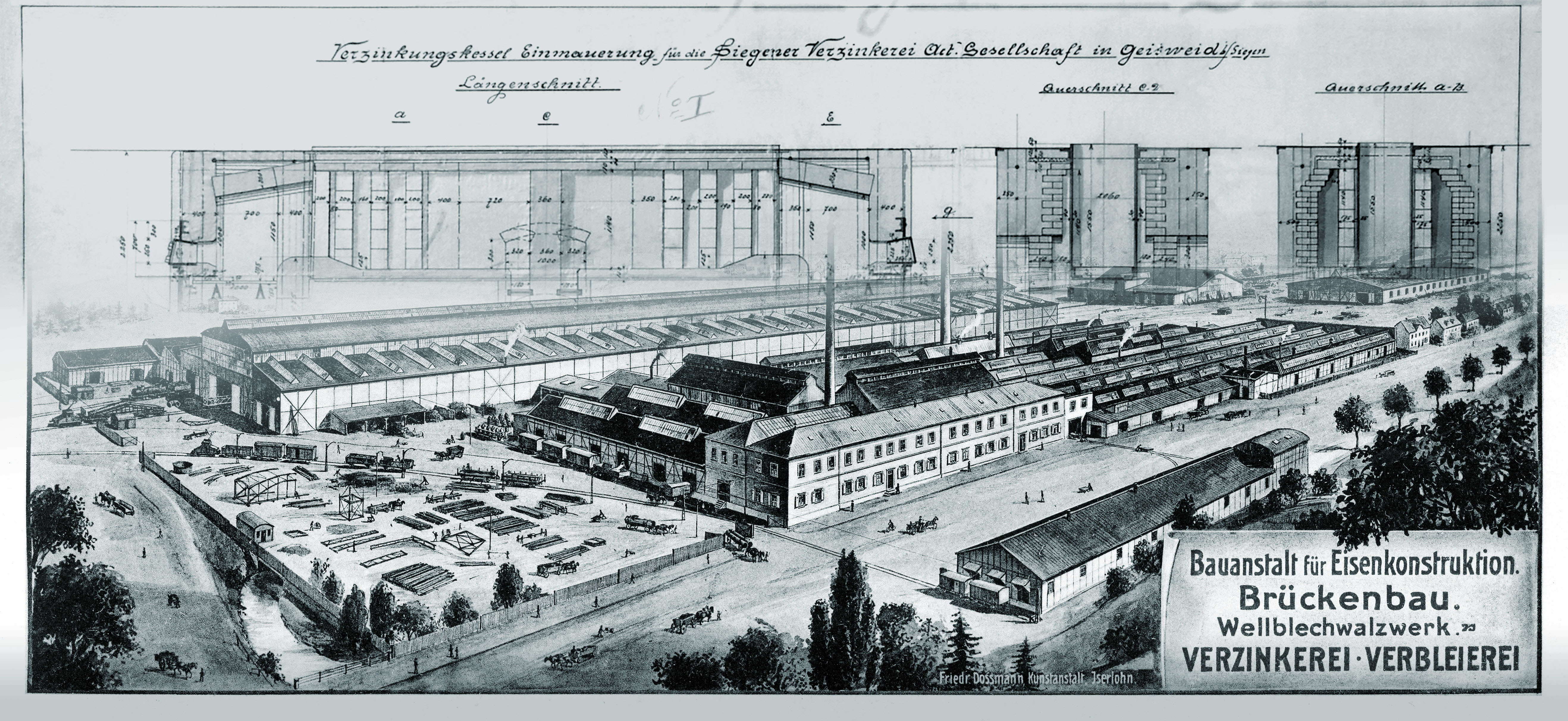 The Coatinc Company seit 1885